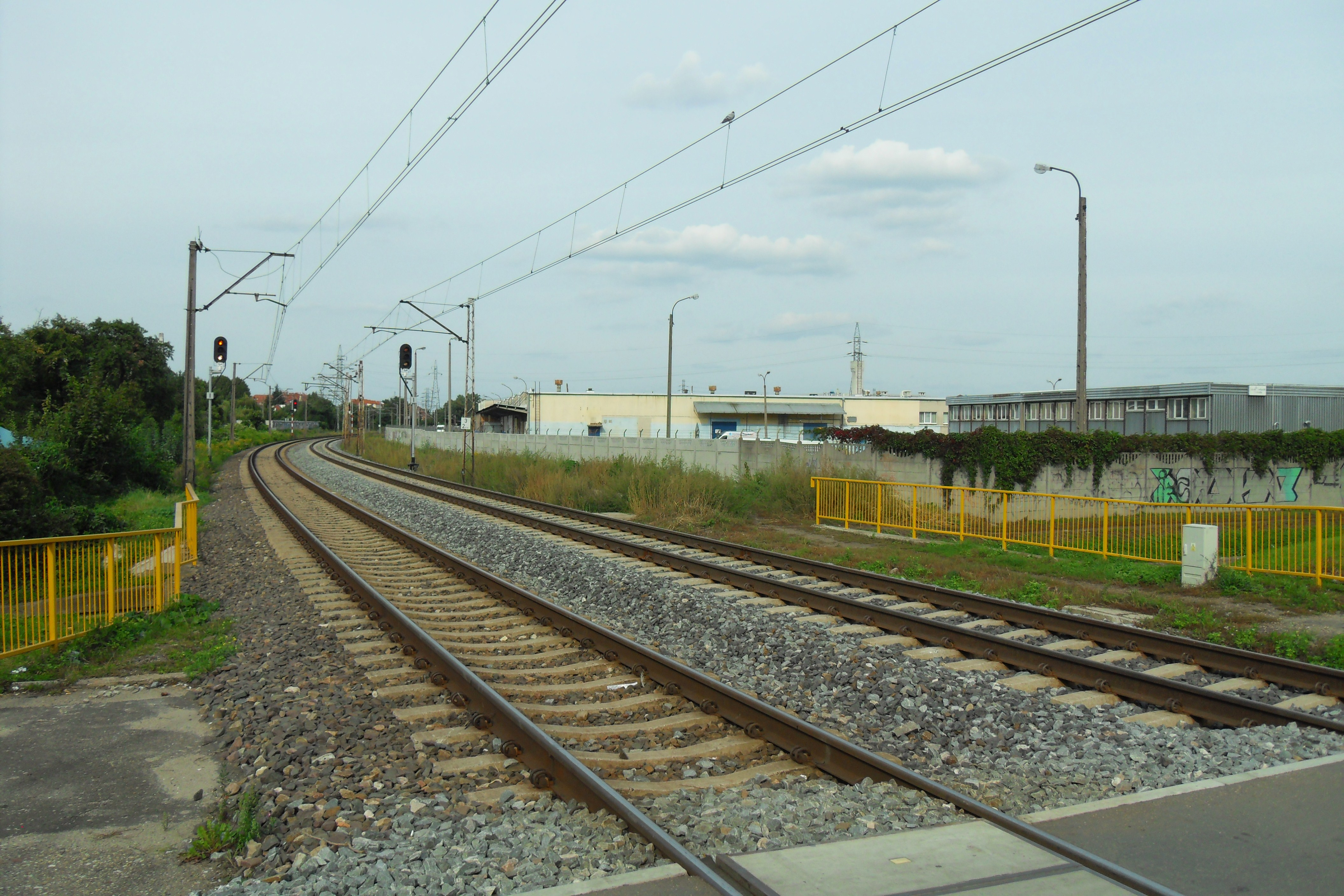 Gdańsk, tory kolejowe przecinające ul. Reja.